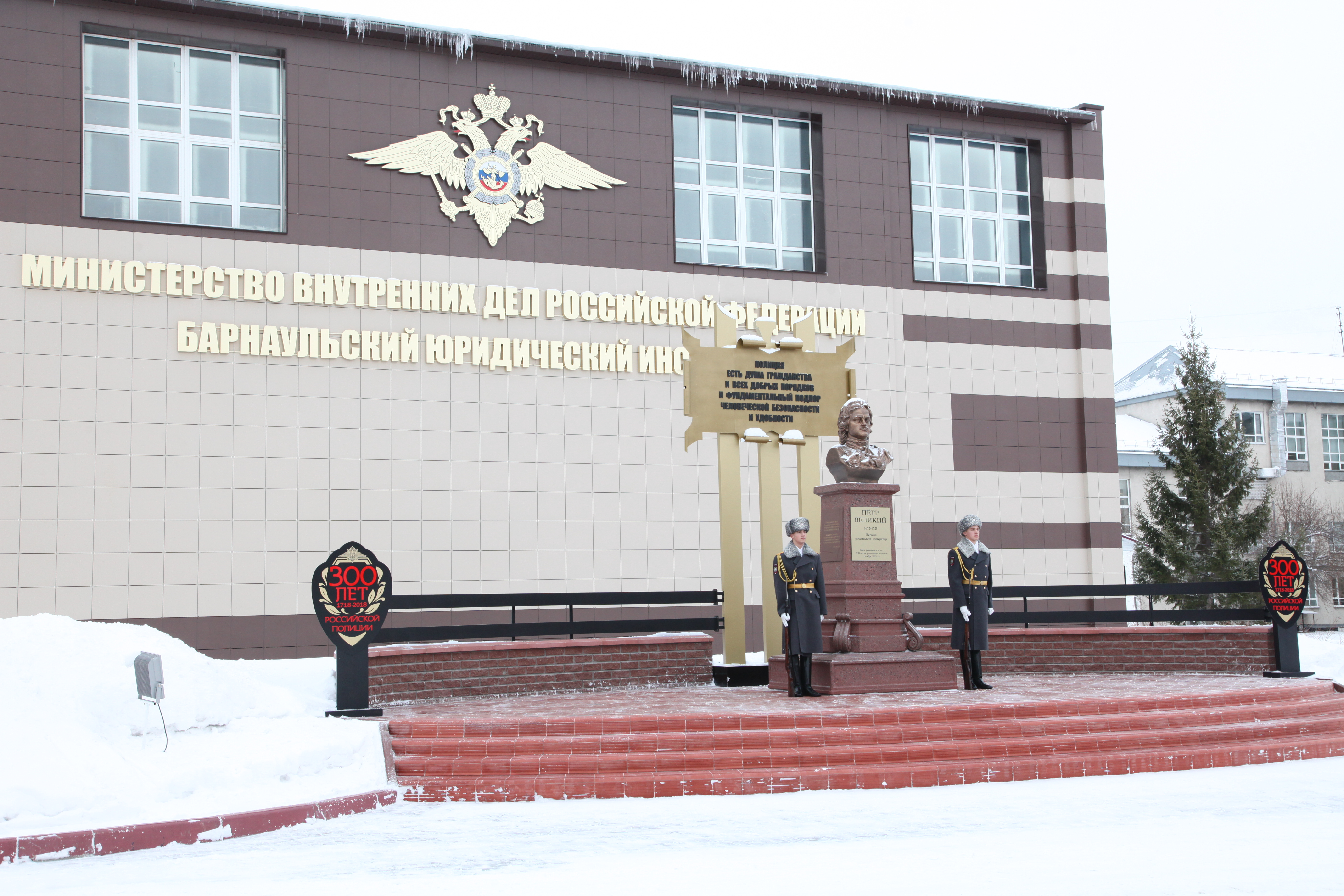 Курсанты взвода почетного караула БЮИ МВД России у памятника Петру I на территории института